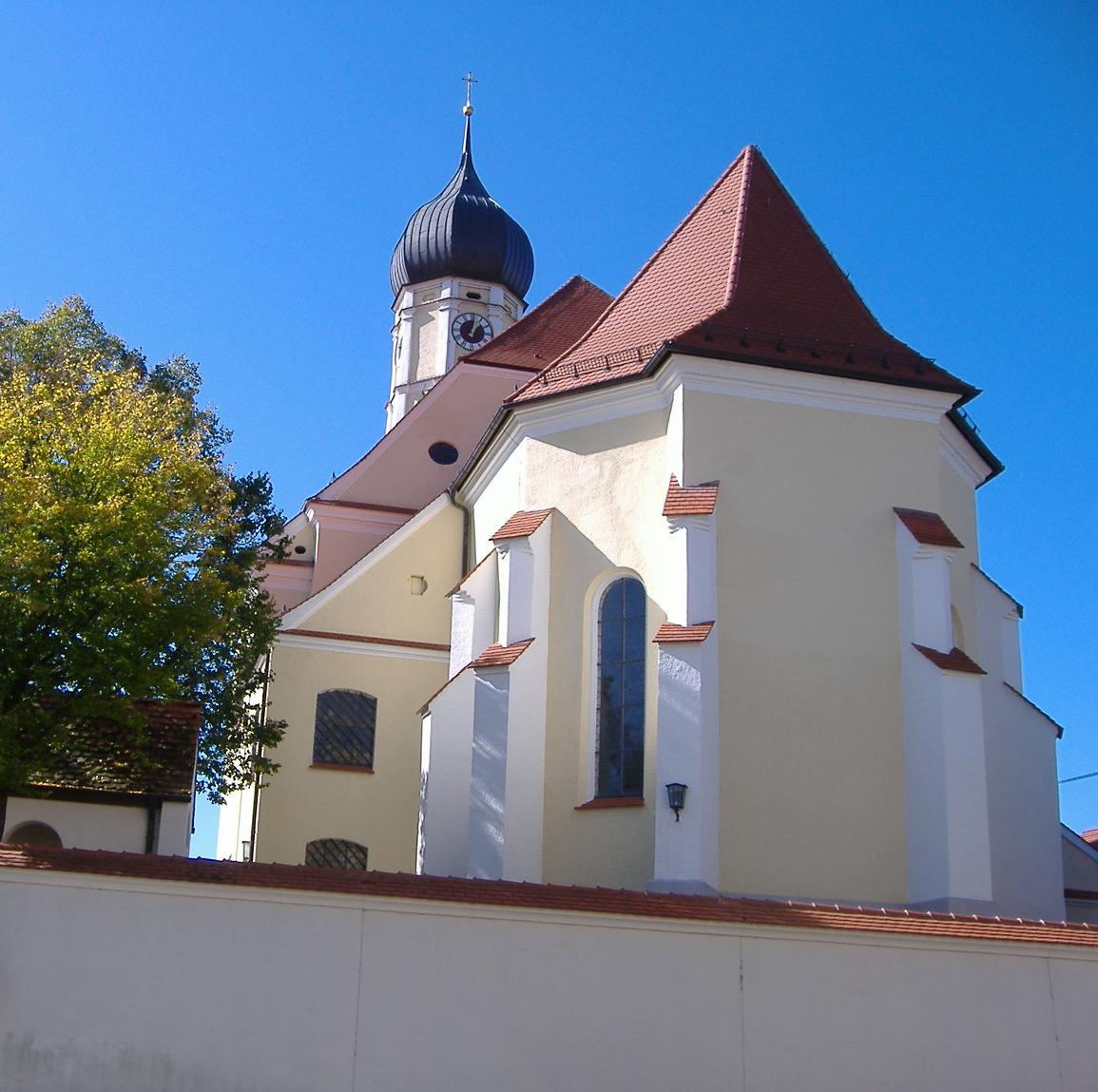 Welden